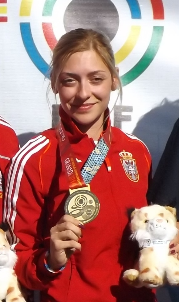 Zenska seniorska reprezentacija pistoljem, prvak sveta na SP u Granadi 2014, s leva: Zorana Arunović, Jasna Šekarić, Bobana Veličković